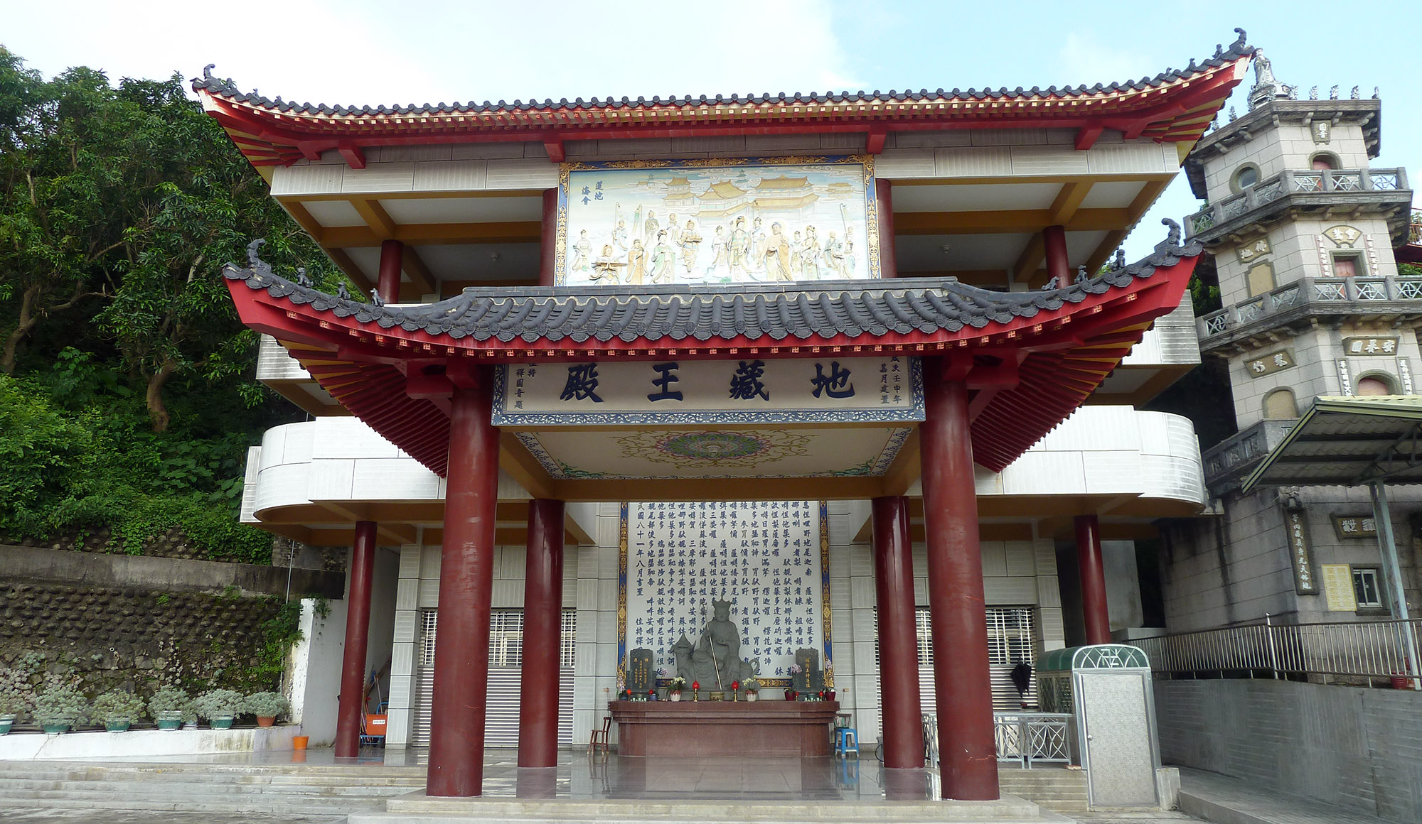 中文（台灣）: 高雄市阿蓮區大崗山蓮峰寺地藏王殿外觀